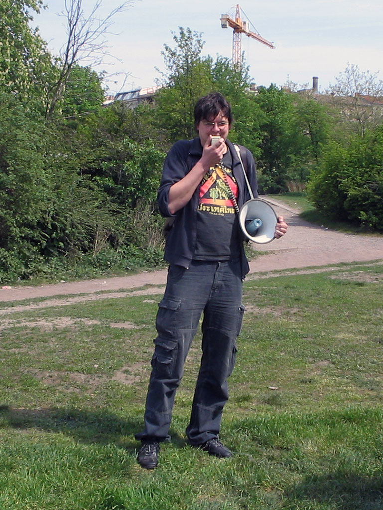 Andreas Krenzke (Pseudonym Spider) auf dem ersten Internationalen Kampf- und Feiertages der Arbeitslosen in Berlin.